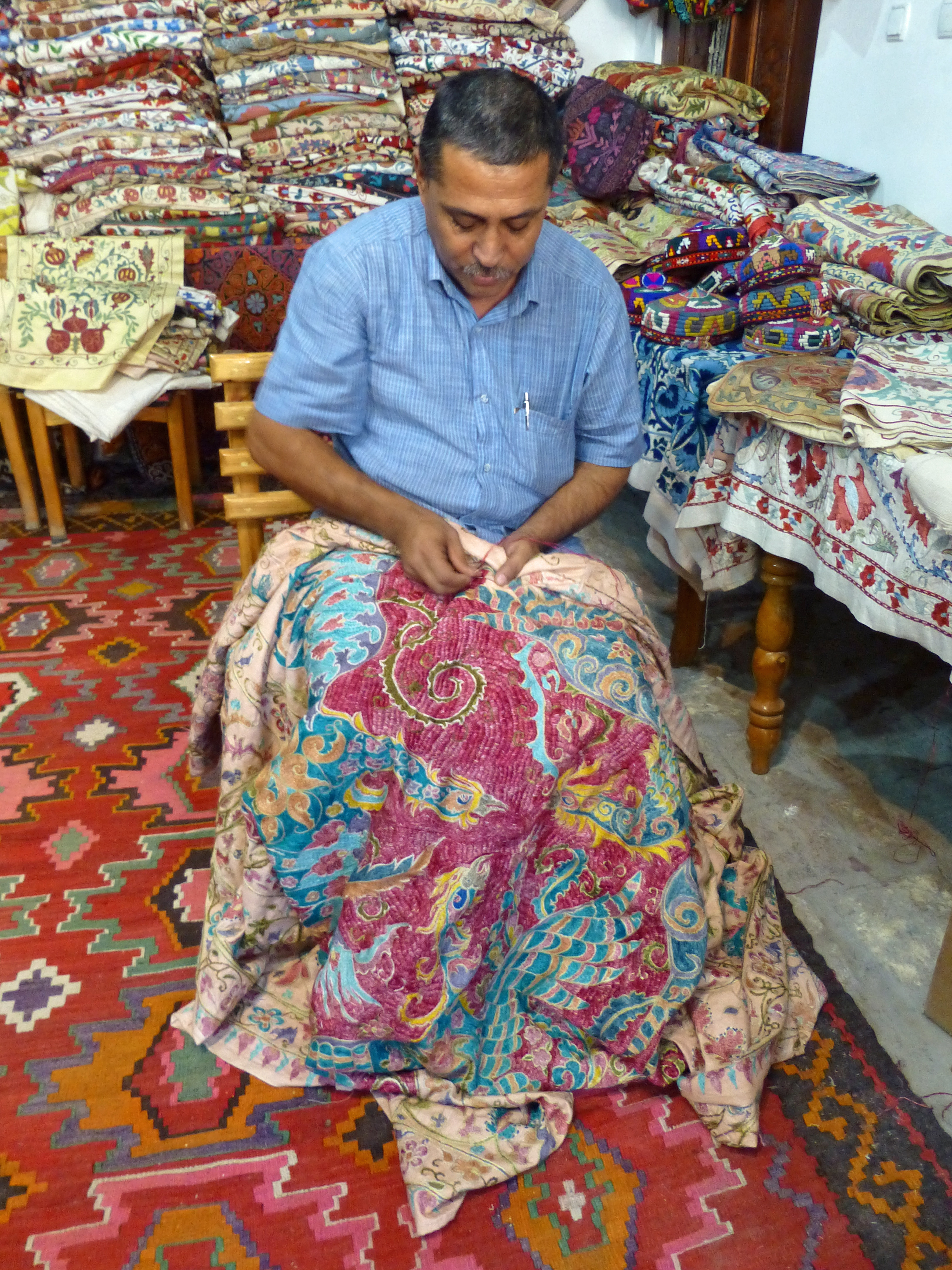 Atelier à Boukhara (Ouzbékistan) : artisan brodant un panneau de type suzani